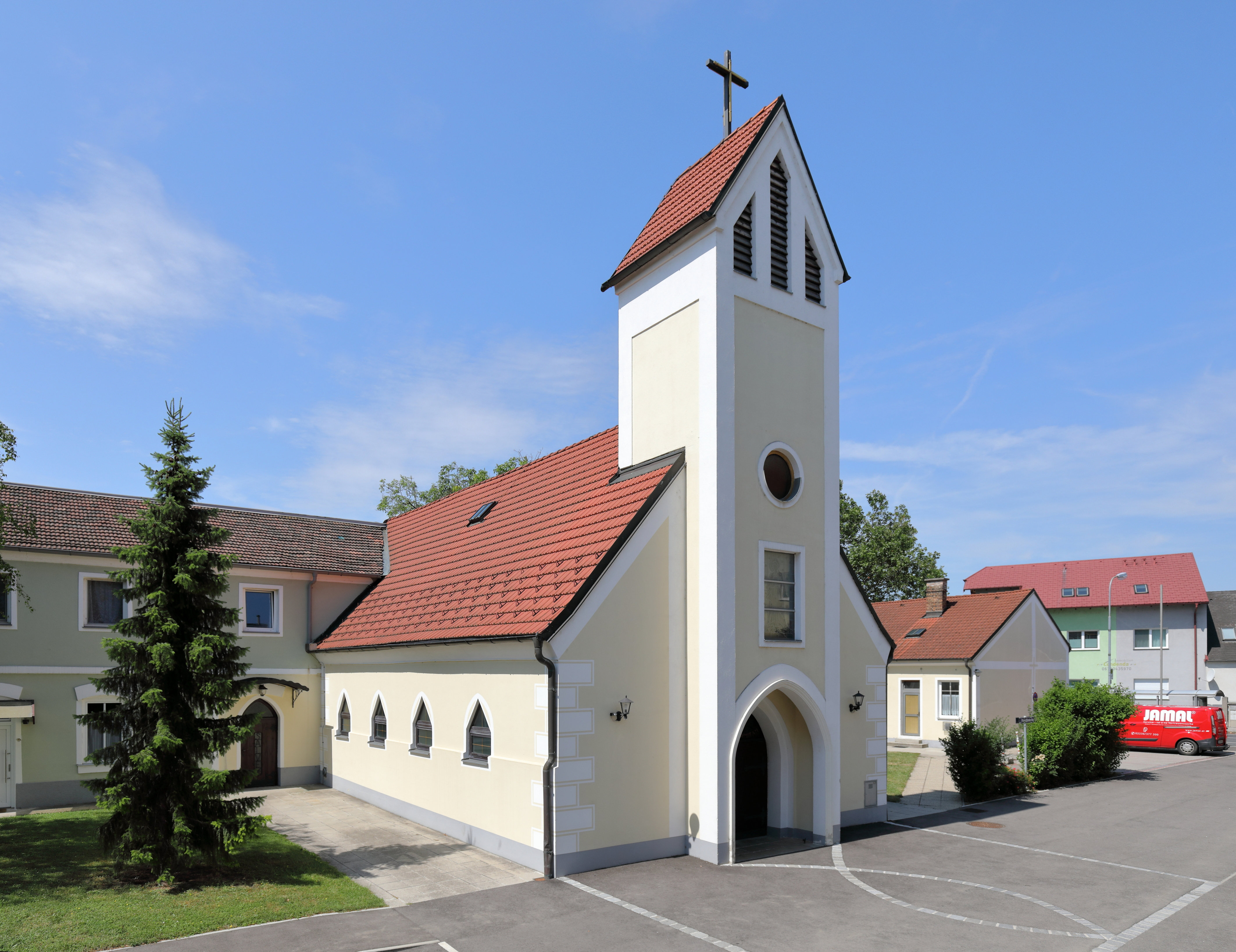 Die röm.-kath. Pfarrkirche „Herz Mariä“ in Rannersdorf, ein Ortsteil der niederösterreichischen Stadt Schwechat.Die Richtung Südwesten ausgerichtete, schlichte Saalkirche wurde nach dem II. Weltkrieg errichtet und am 28. November 1948 von Kardinal Innitzer eingeweiht. Ursprünglich hatte die Kirche anstelle eines Turmes nur einen Glockenträger. Anfang der 1990er Jahre wurde dieser durch einen Turm ersetzt.